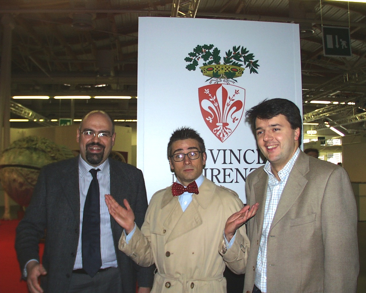 Giampaolo Cerri , Mr. Brown (Andrea Pellizzari) e Matteo Renzi